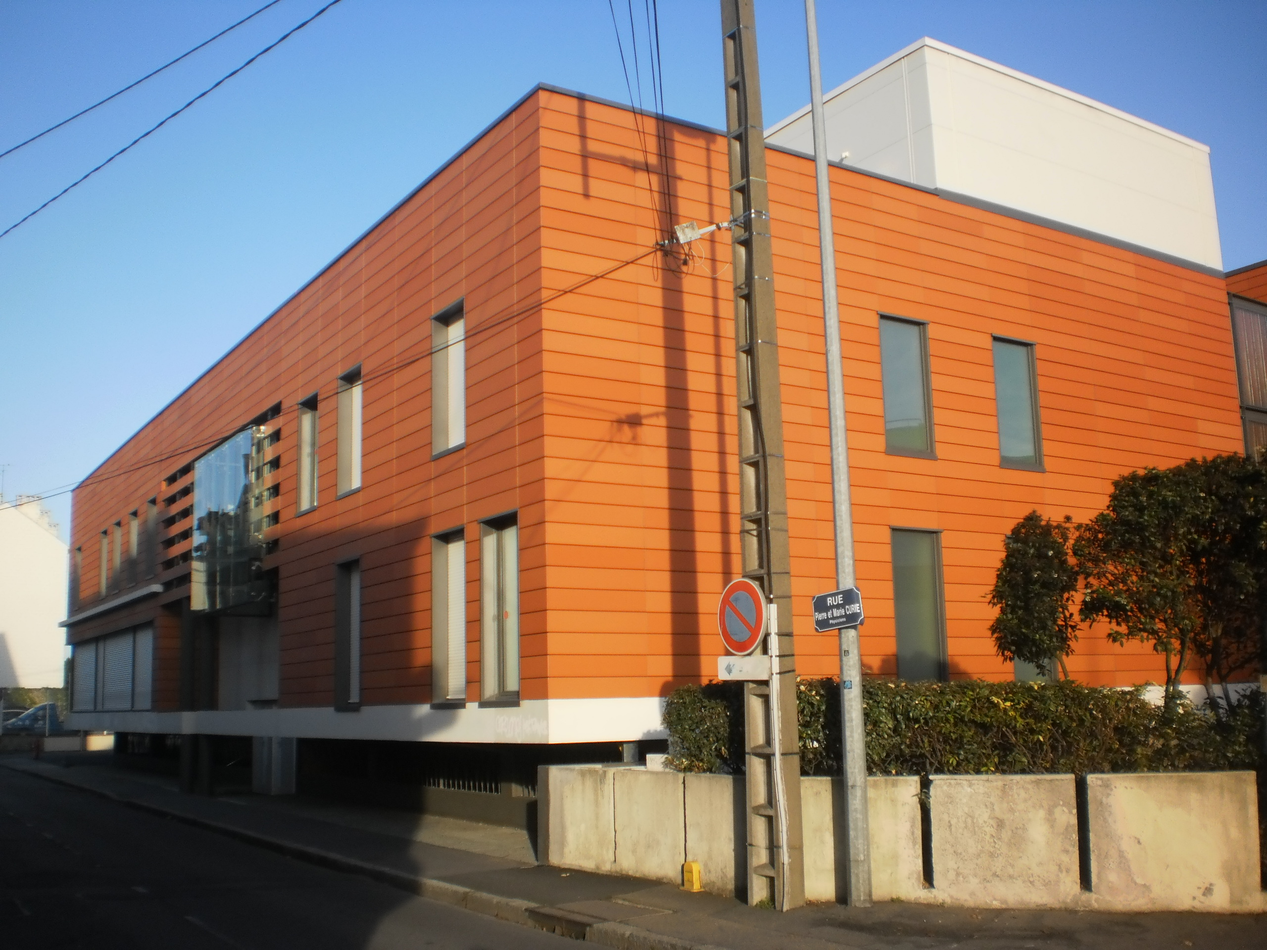 Bâtiment de l'hôpital Bellier (Nantes - France)